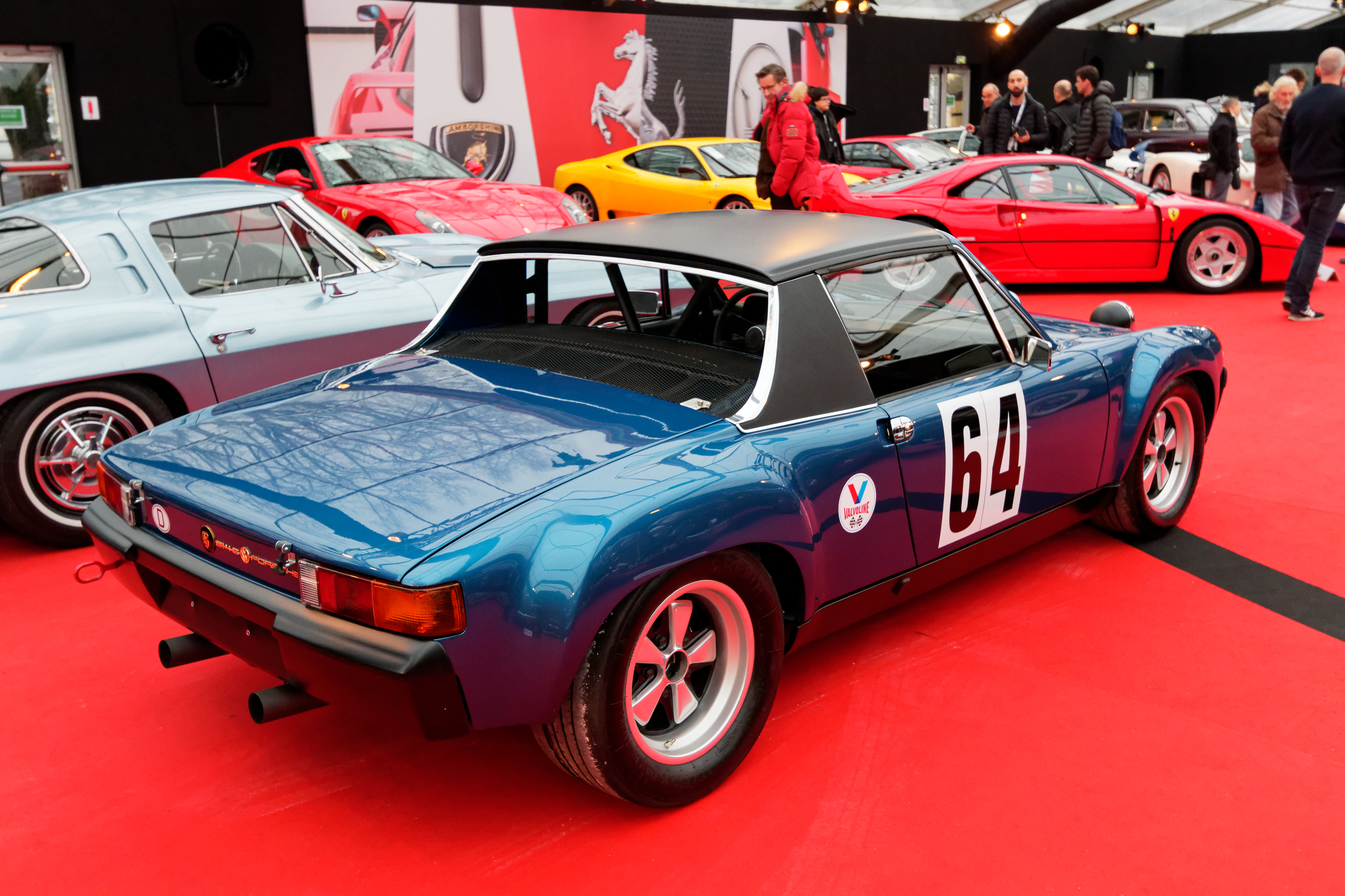 Un véhicule exposé lors de la vente RM Sotheby’s 2018 aux Invalides à Paris.